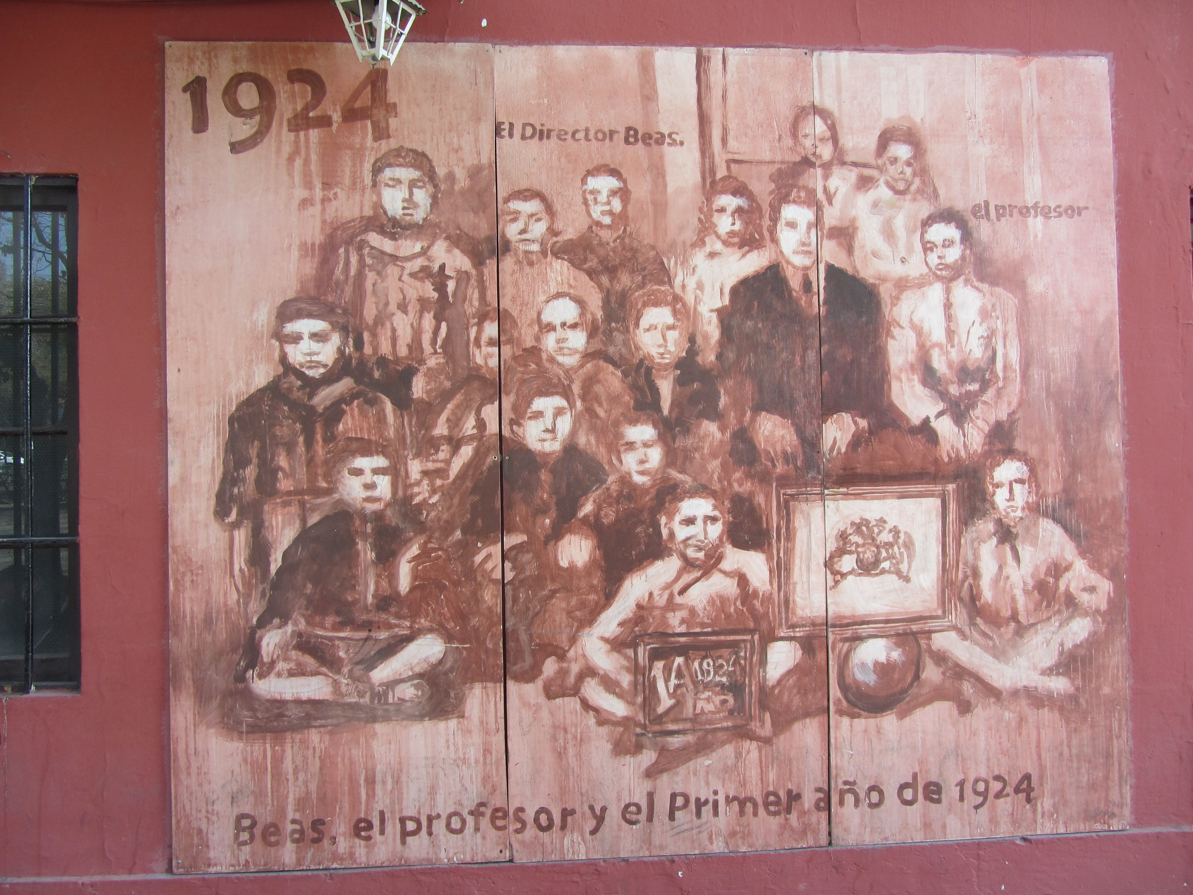 Casa de la Cultura de San Miguel